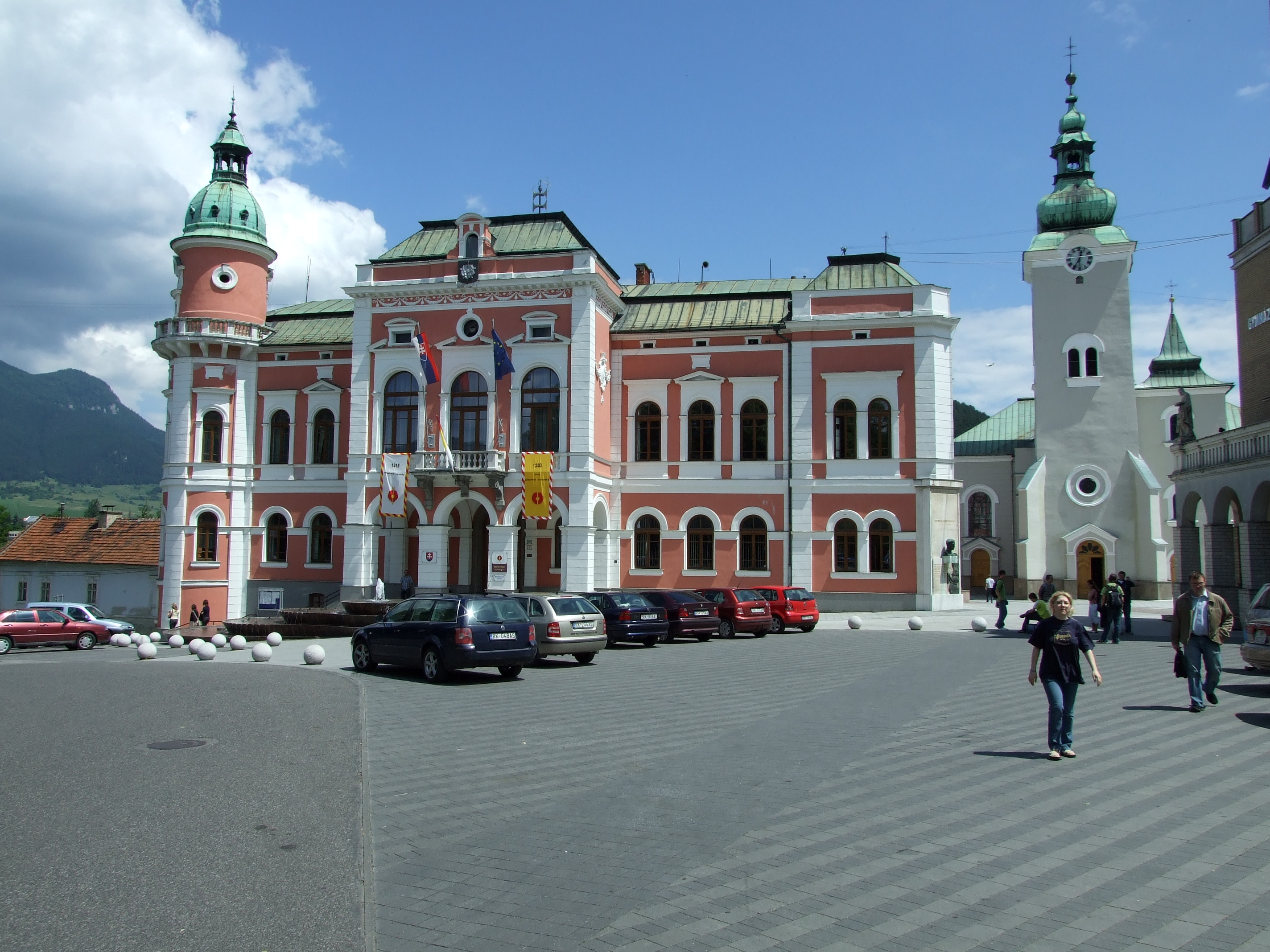 Radnica v Ružomberku